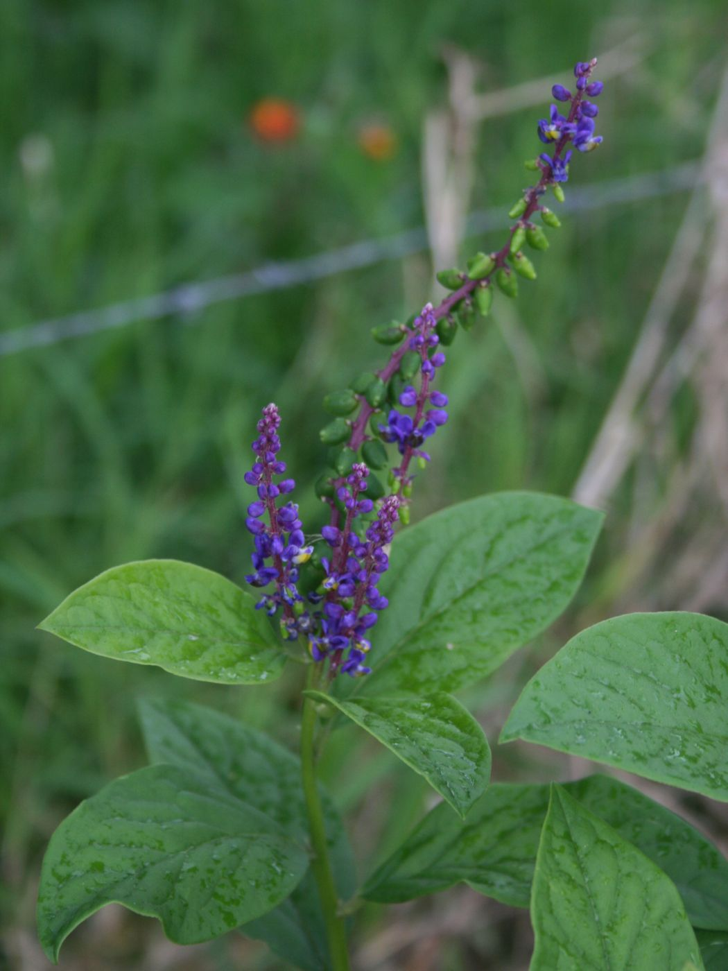 Monnina parasylvatica, Kreuzblumengewächse (Polygalaceae) - Costa Rica: Prov. Cartago, Orosi